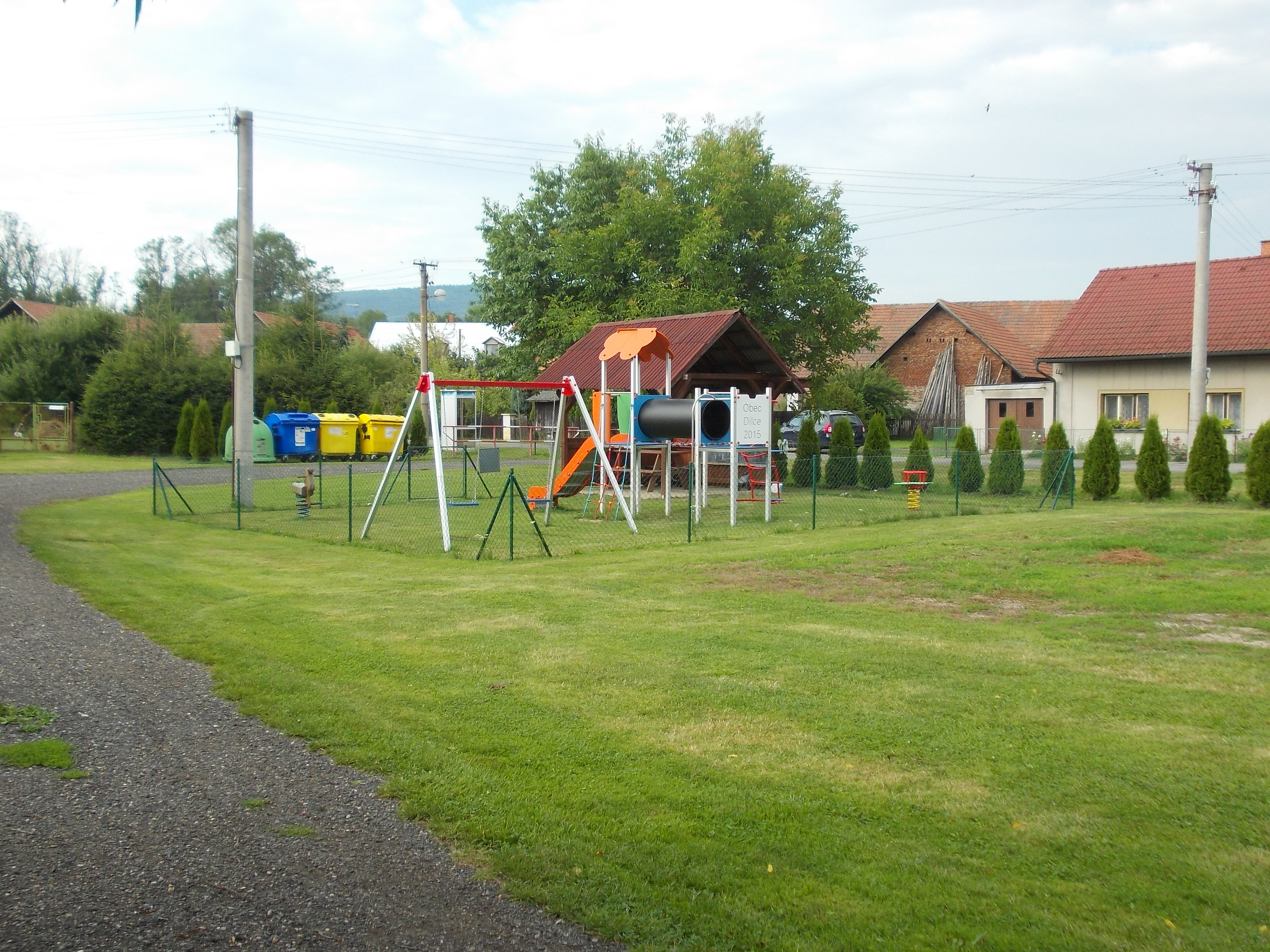 Dílce - dětské hřiště